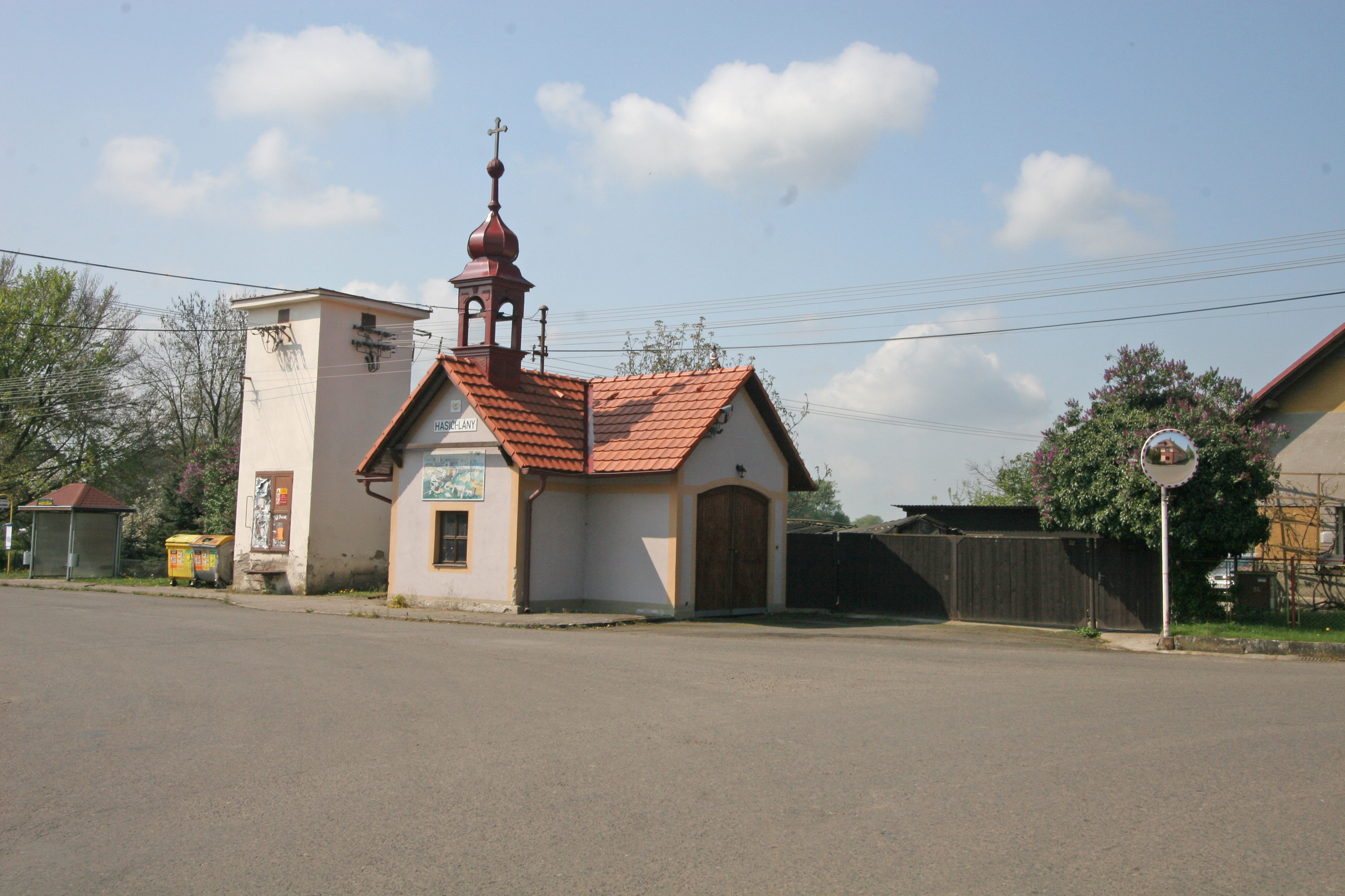 Lány u Dašic hasičská zbrojnice